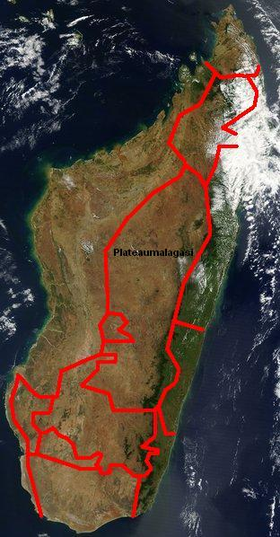 Taalgebied Plateaumalagasi. Eigen werk, op basis van Commonsafbeelding.